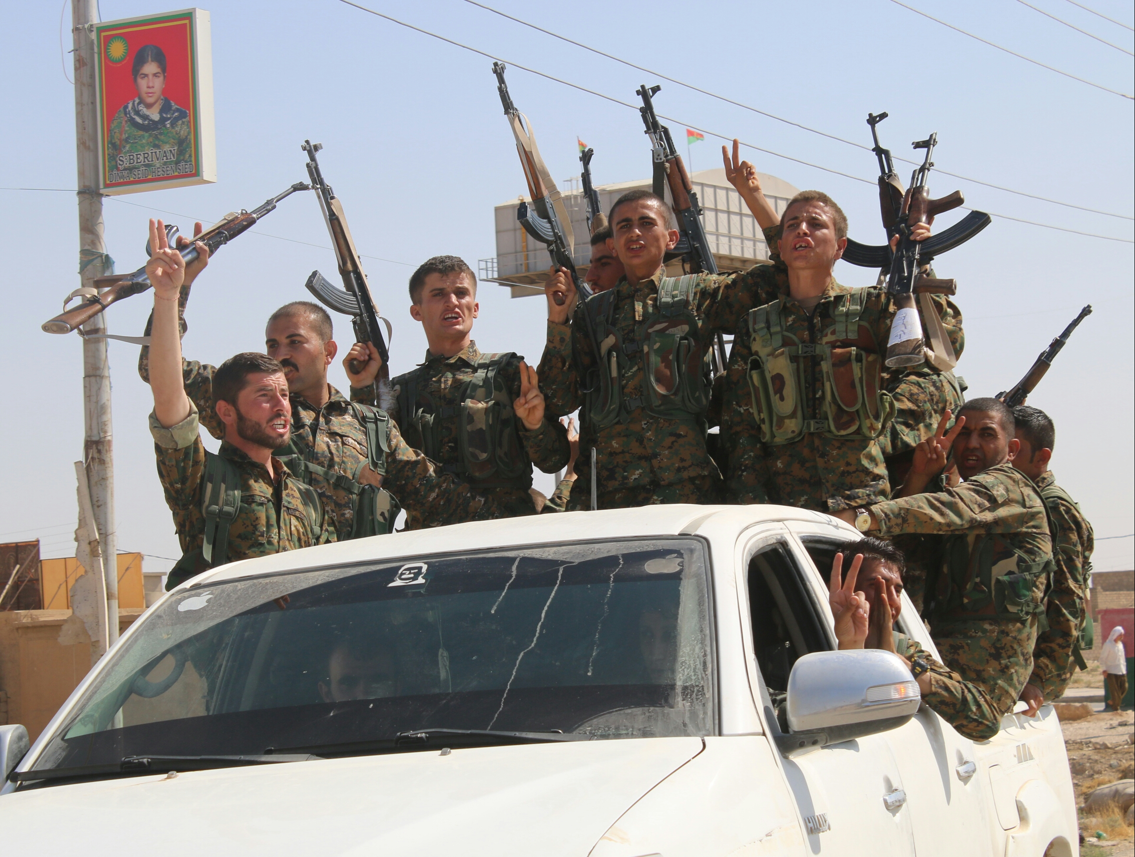 YPG